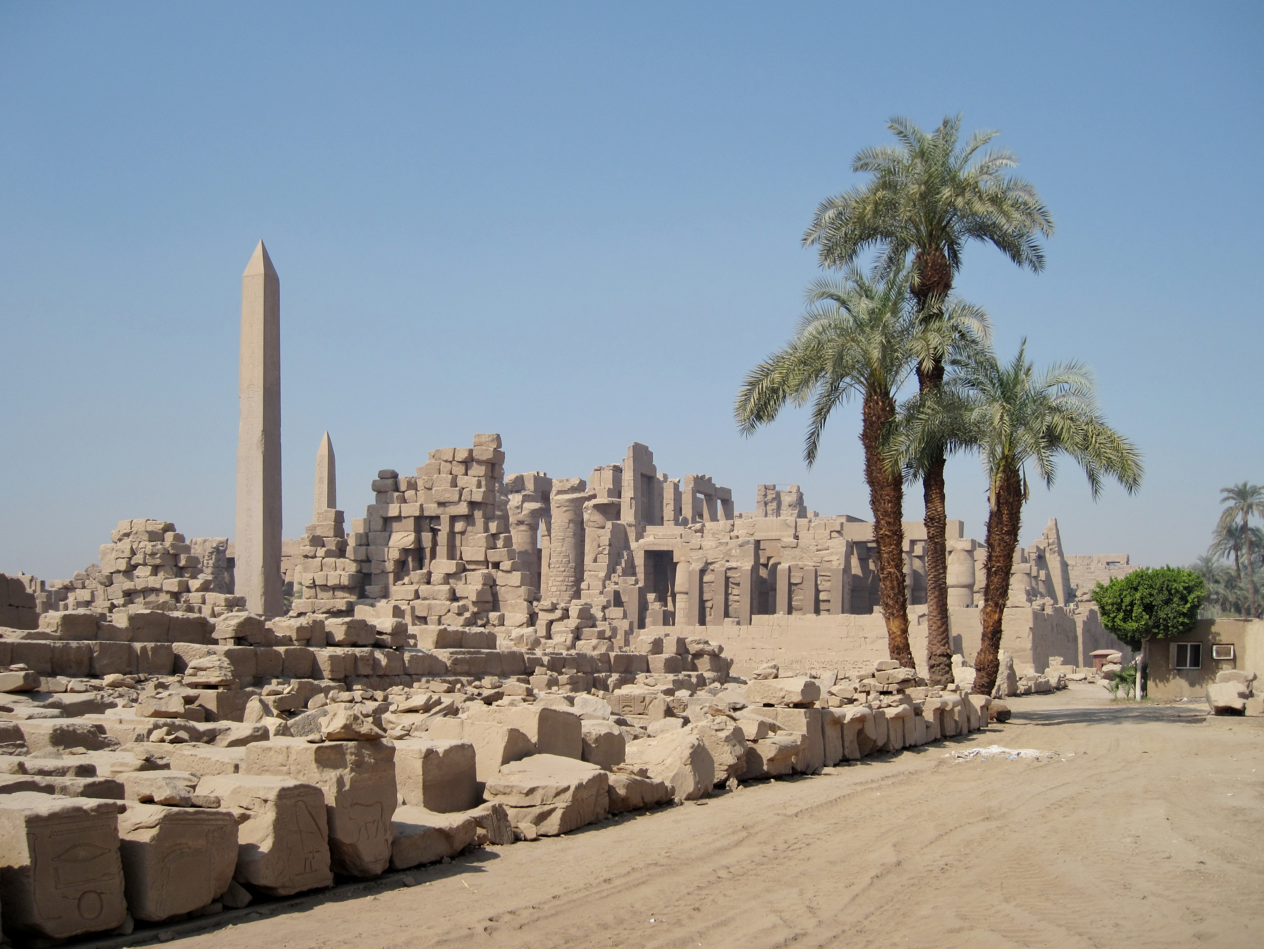 Nordseite des Tempels von Karnak, nördlich von Luxor, Ägypten